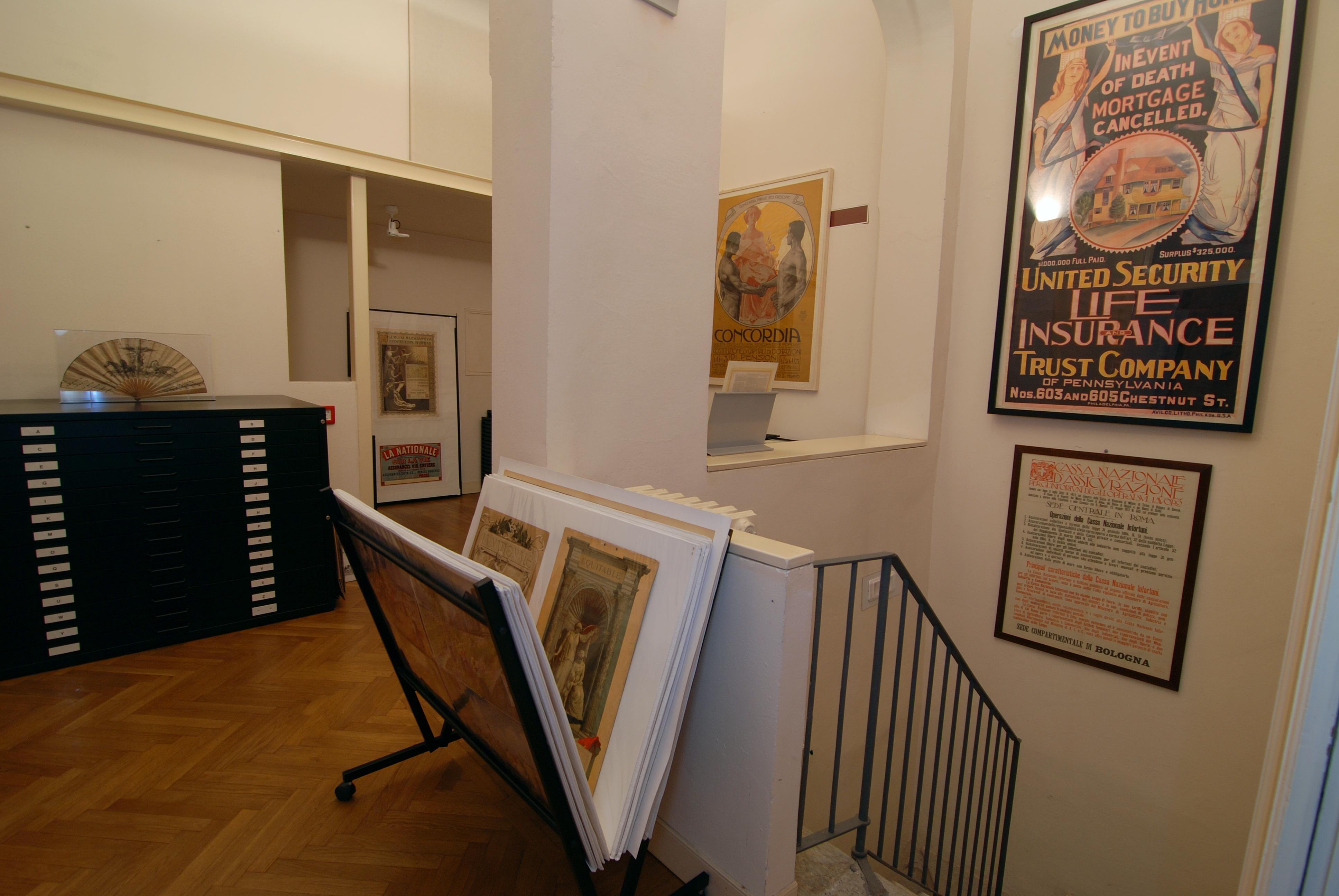 Fondazione Mansutti